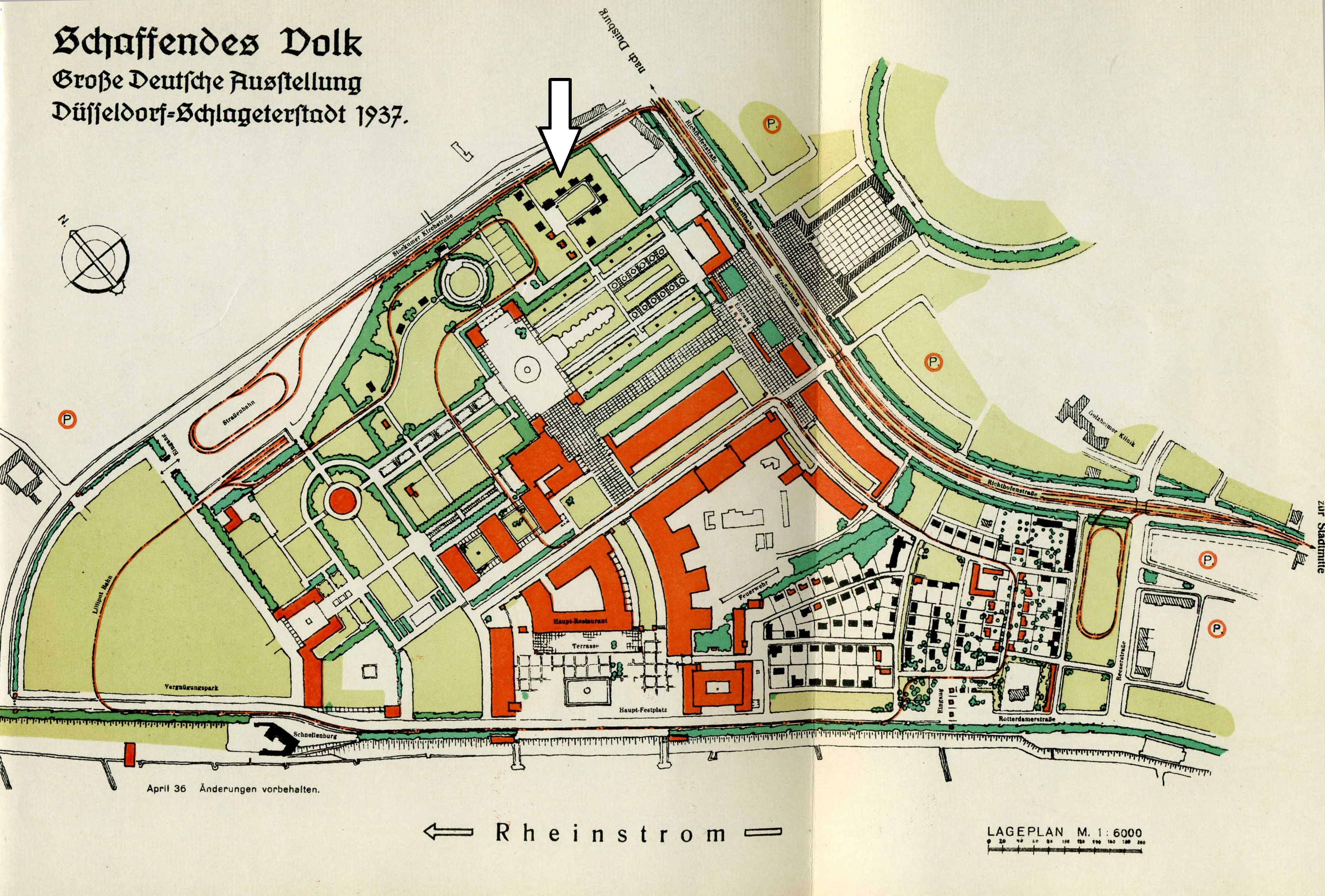 Lage der Nordparksiedlung Düsseldorf auf der Karte der "Reichsausstellung Schaffendes Volk"